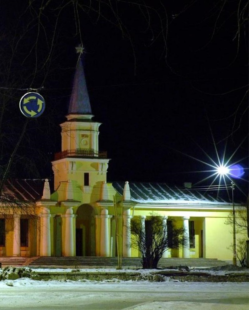 вокзал